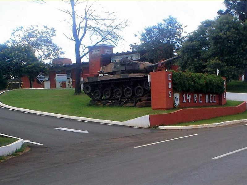 Exército 14 RCMEC SMOESTE